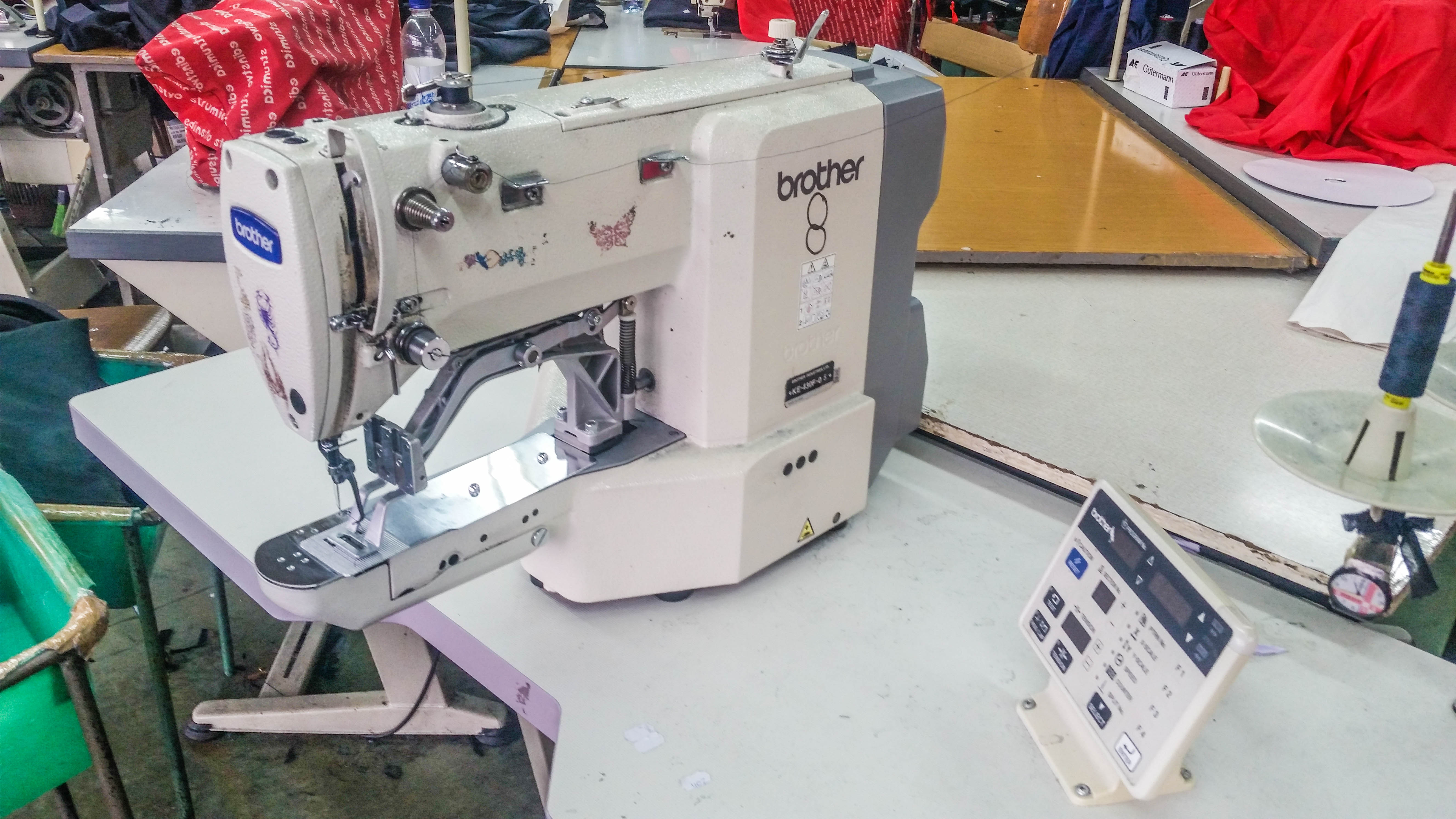 Индустриска машина за шиење Brother